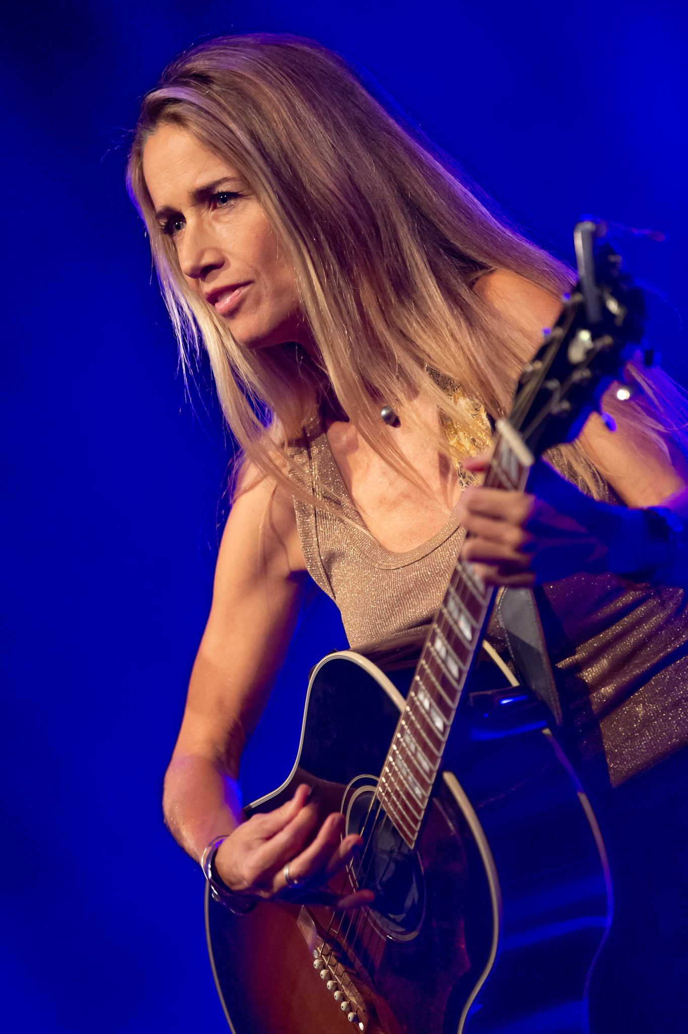 Concertbüro Franken,Heather Nova,Konzert,Livekonzert,Livemusik,Löwensaal,Musik